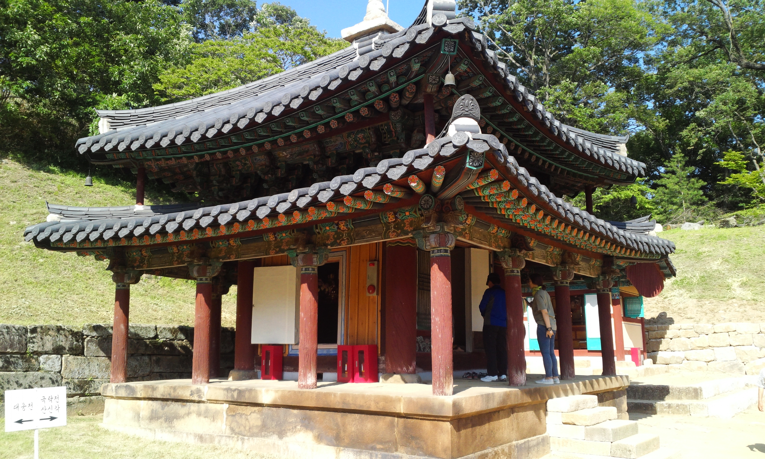 봉암사 극락전(2015년 5월 25일 촬영)